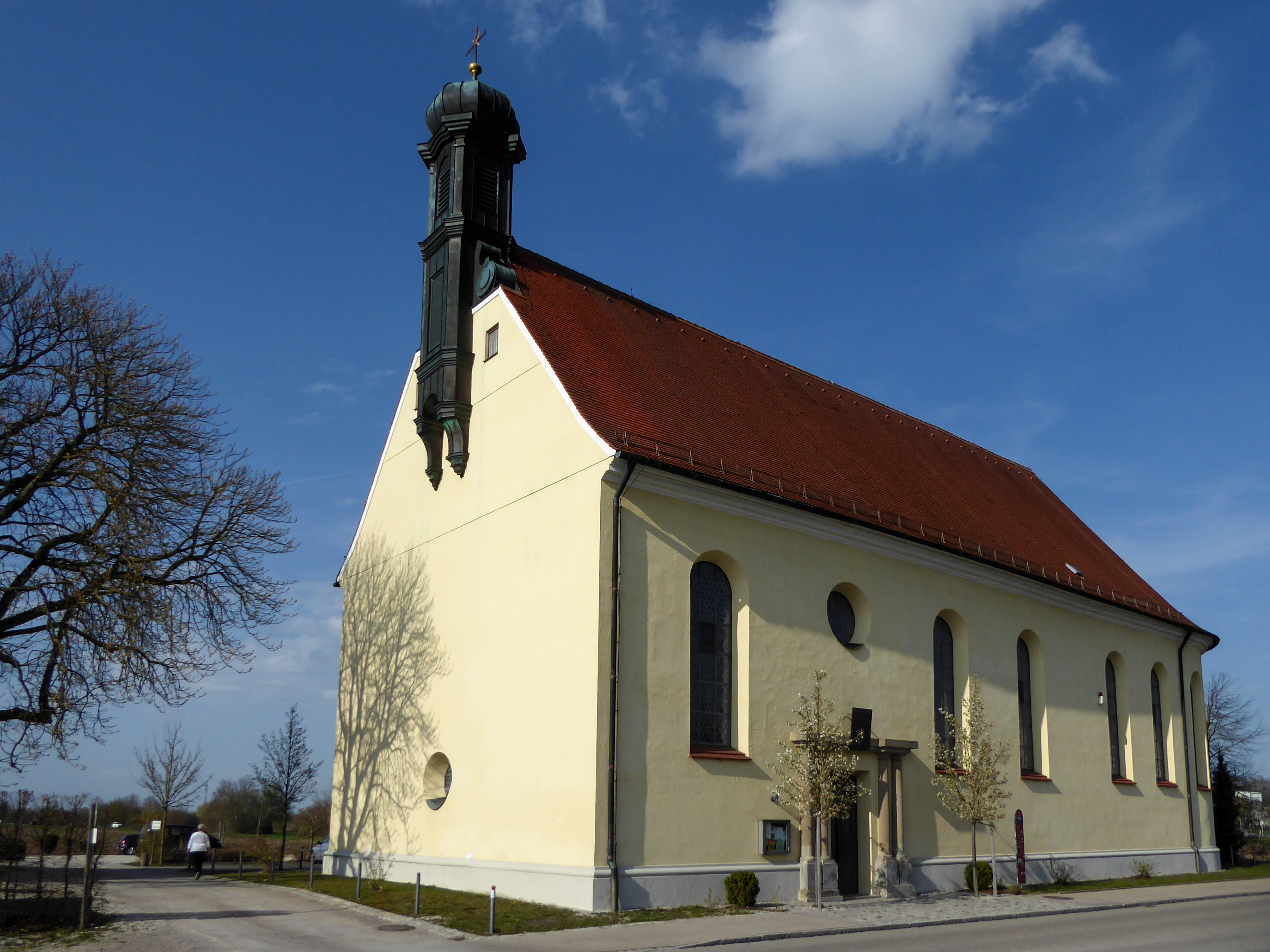 Ansicht der Wallfahrtskirche St. Afra im Felde